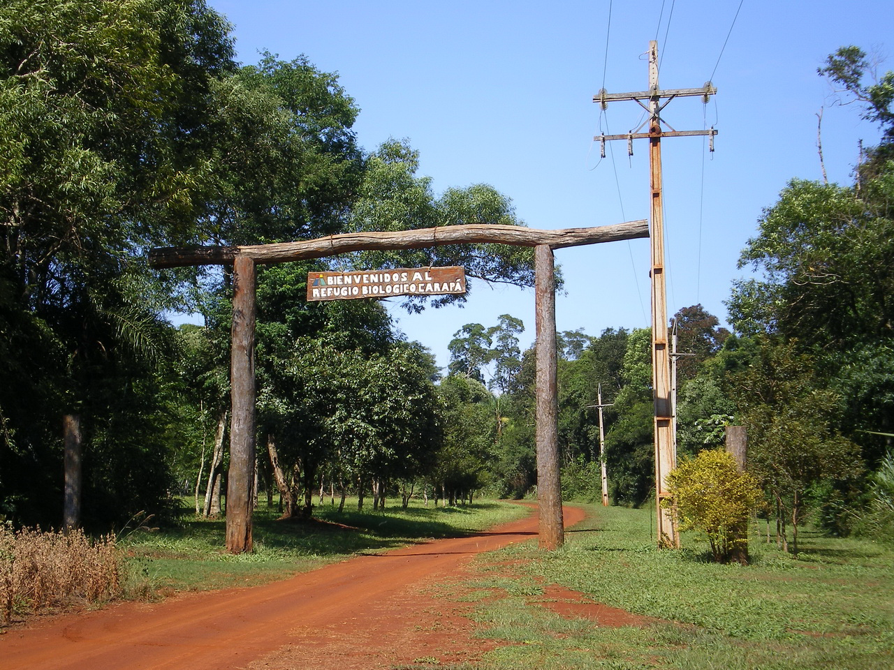 Fotos de los refugios y reservas de Itaipu, tomadas en los años 2007 y 2008 por mí Refugio carapá